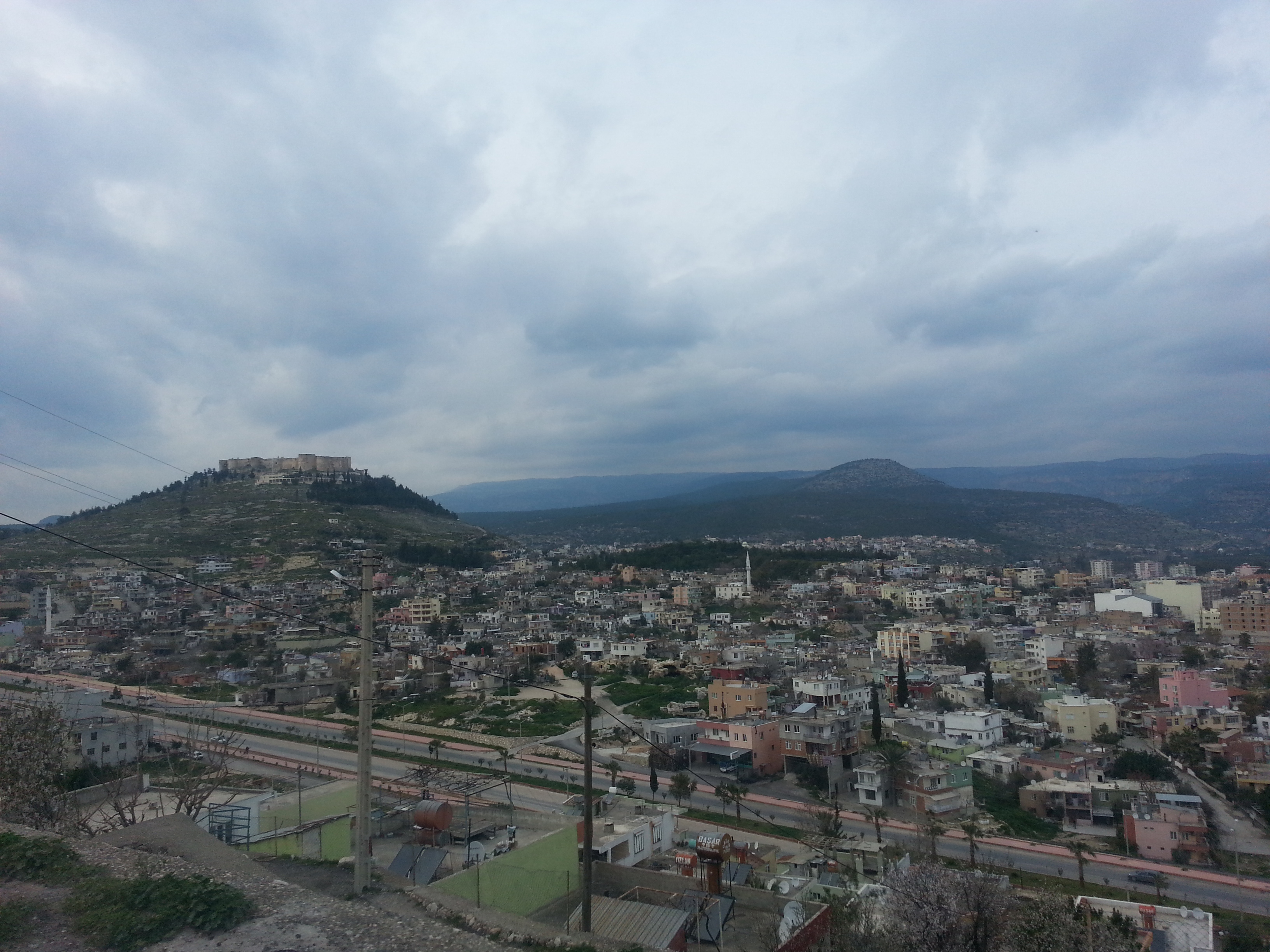 Yüksek bir noktadan Silifke Kalesi ve Silifke görünümü.